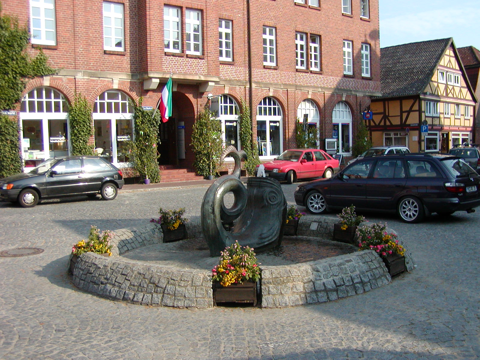 Markt in Hitzacker